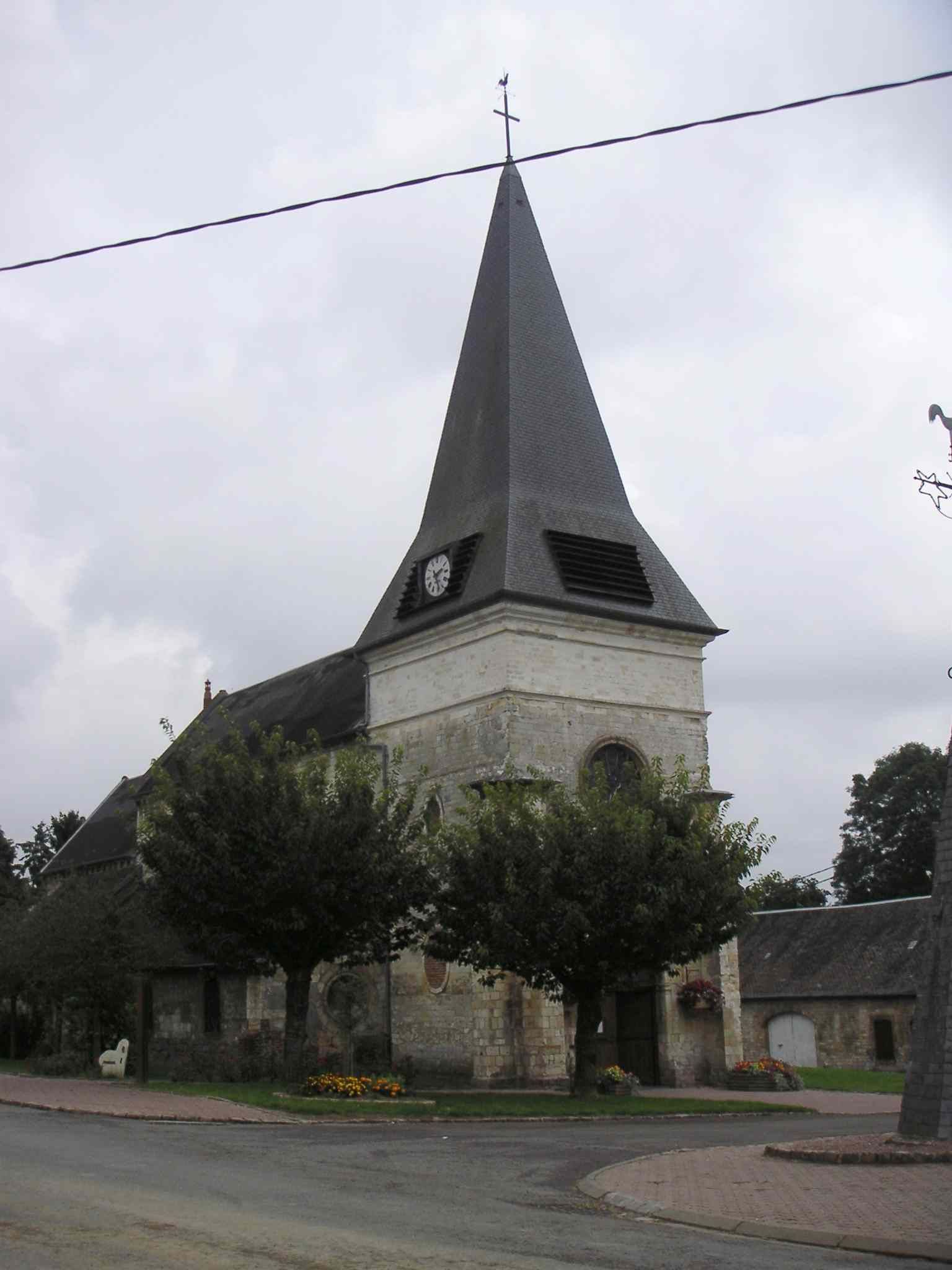 Cette photo de l'église de Vadencourt (Aisne) a été prise par mes soins.